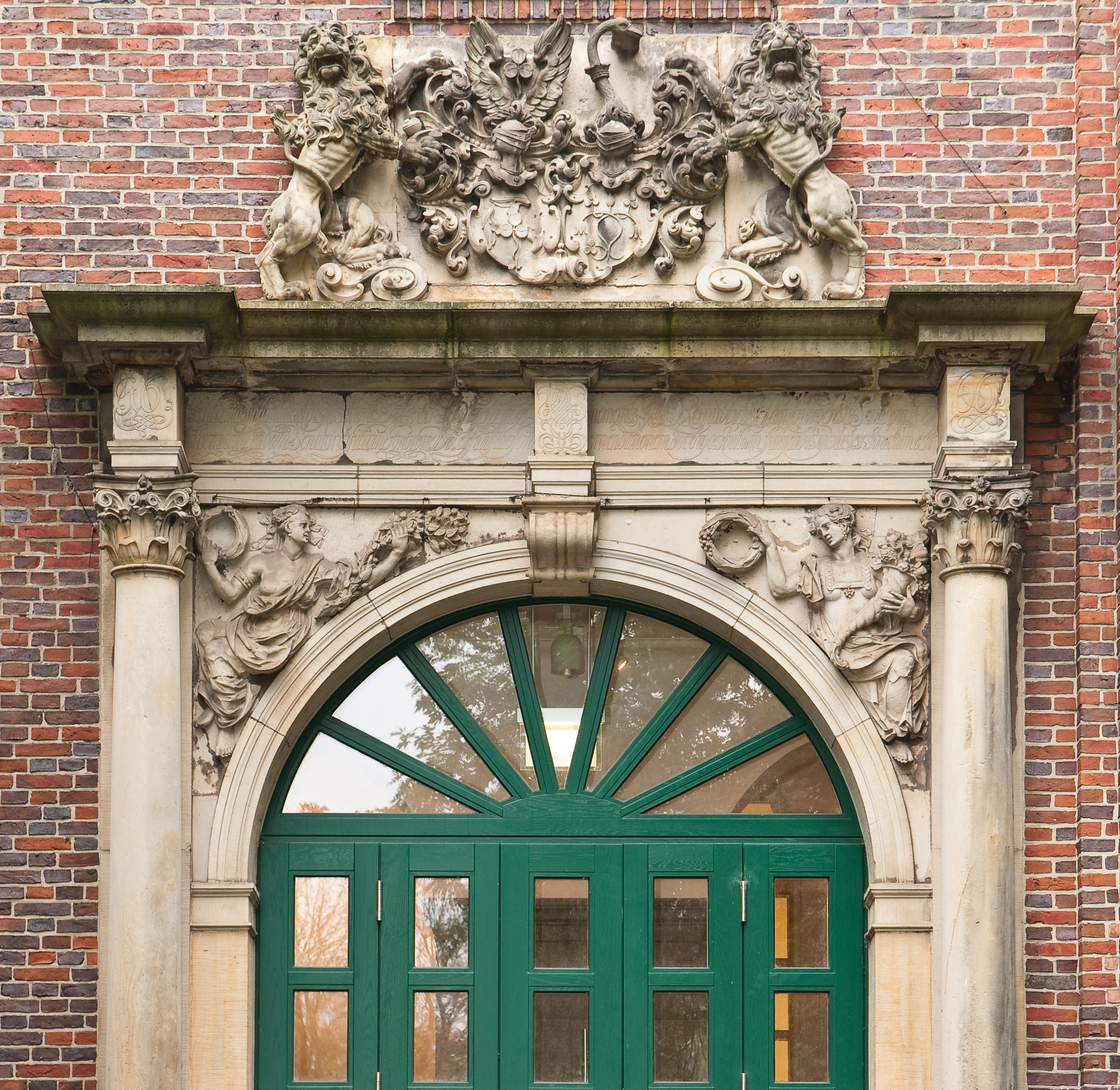 Standort:Angebaut an MHG, Westseite, nördl. Teil der Terrassenwand (rechte Seite der Terrasse vom Betrachter aus) Herkunft: ehem. Spinnhaus an der Alster, neben Werk- u. Zuchthaus; Wappen der Stifter Ehepaar Rentzel Portalinschrift: Ex voluntate et dispositione Dni. Petri Rentzelii piae memoriae J.U.L. Peipublicae hamburgensis Senatoris, Hermanni, itidem